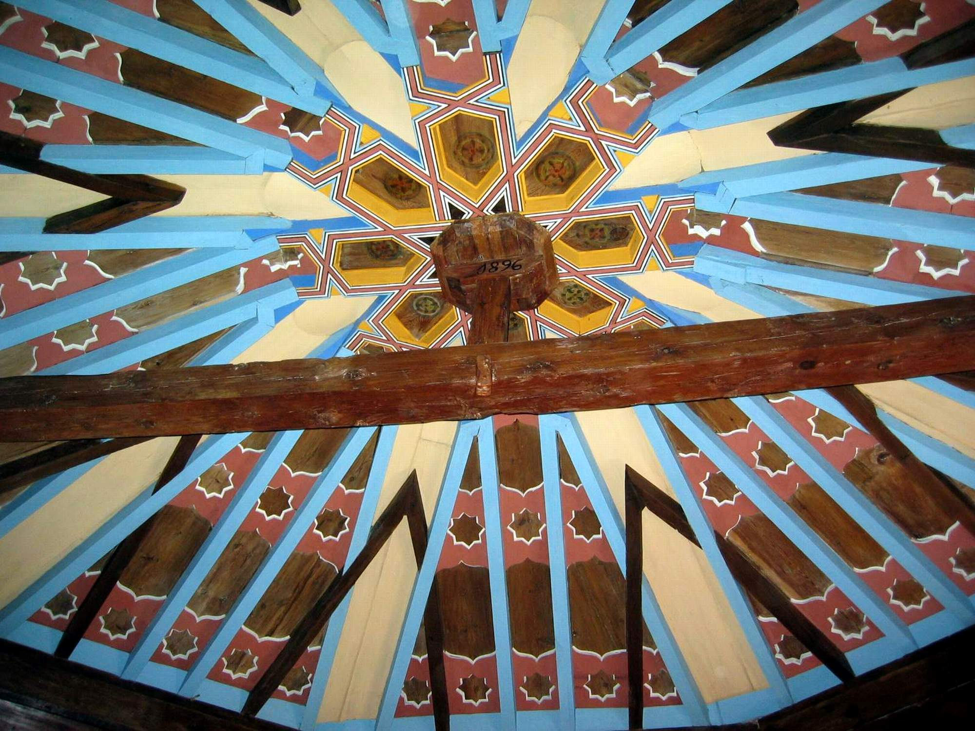 Detalle de la cúpula mudéjar de la ermita de Santerón en Algarra (Cuenca), tras su restauración, año 2012.